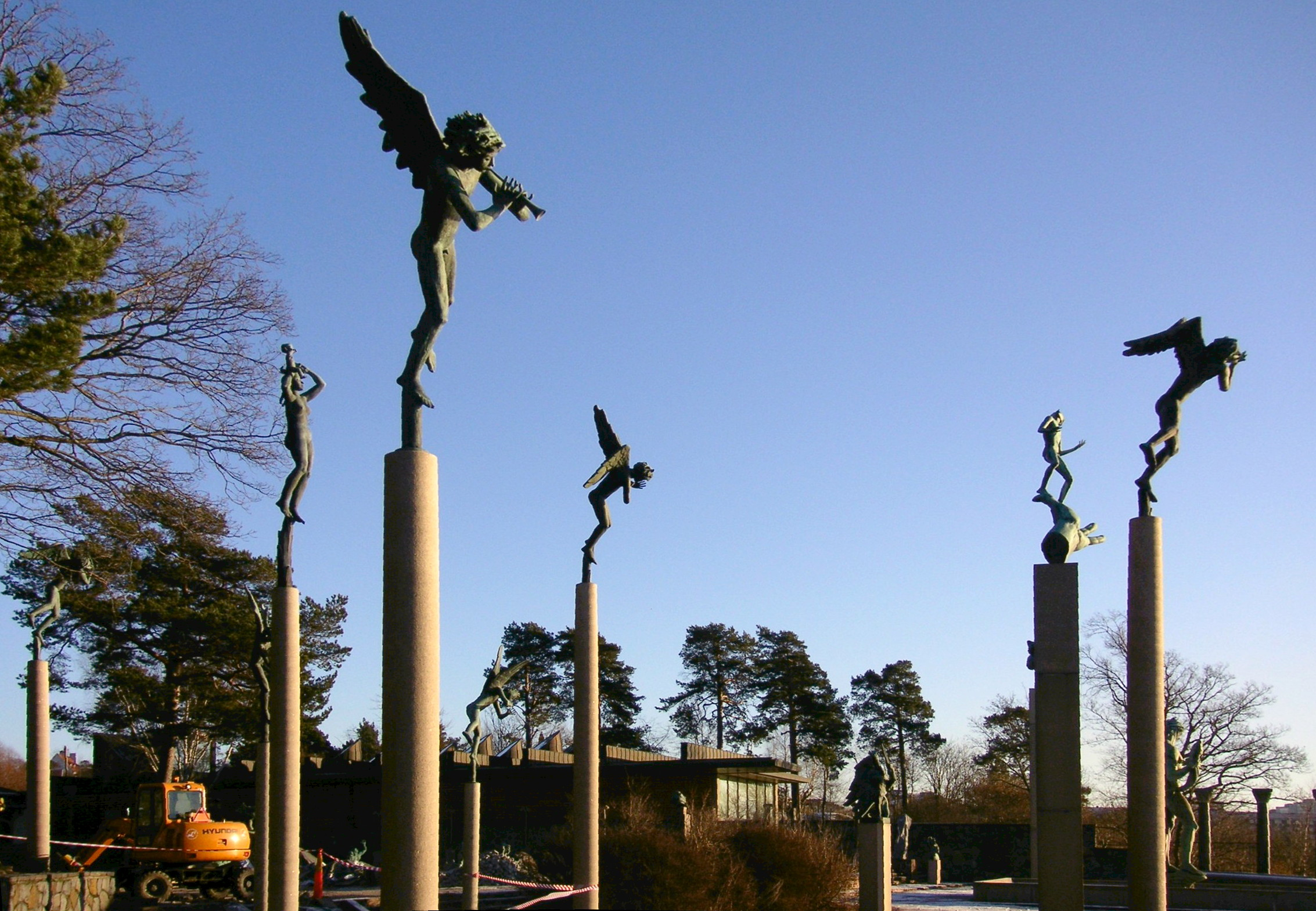 Carl Milles skulptur "Musicerande änglar" och "Guds hand" i bakgrunden